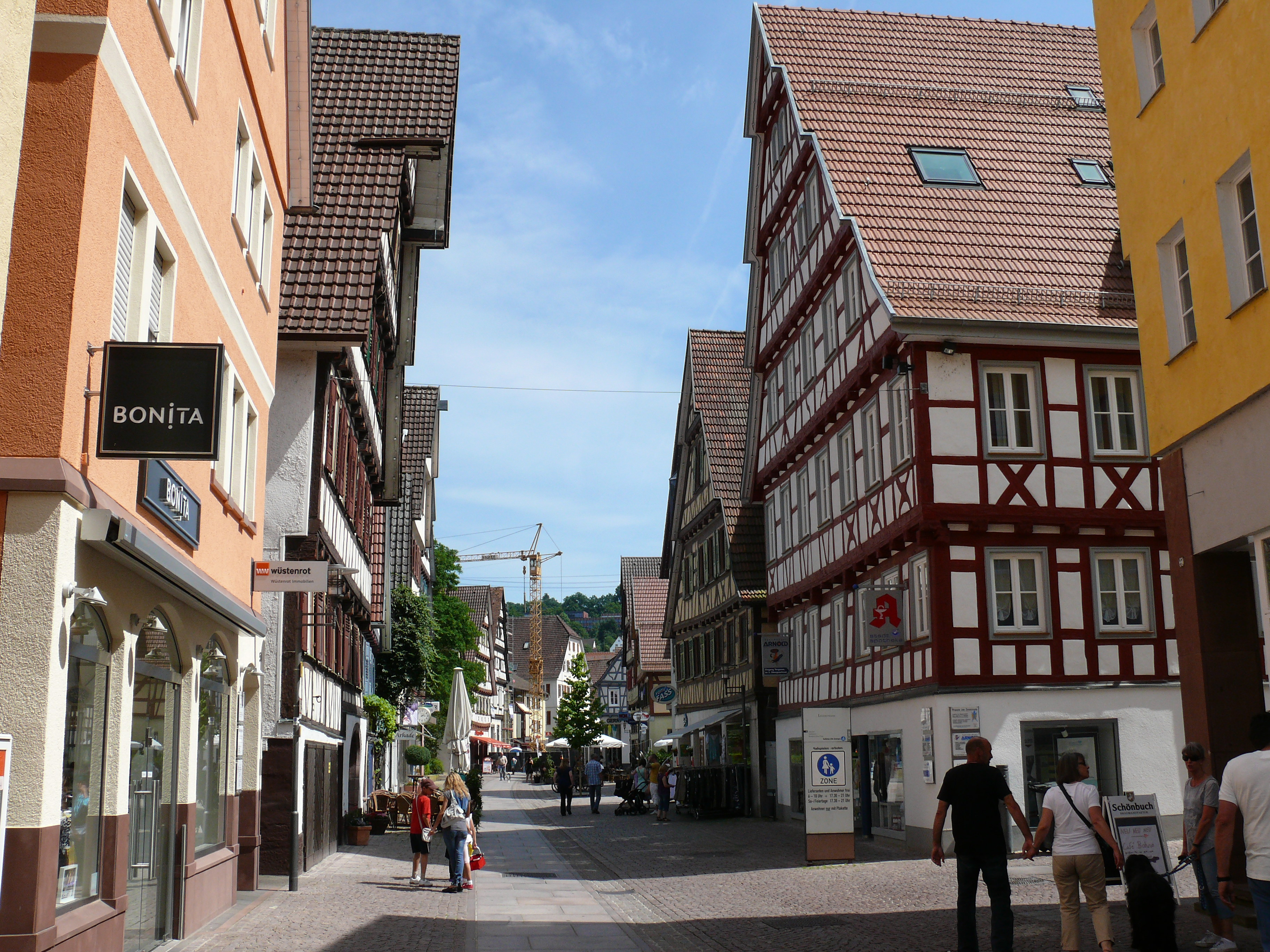 Die Lederstraße, Haupteinkaufsstraße in Calw.